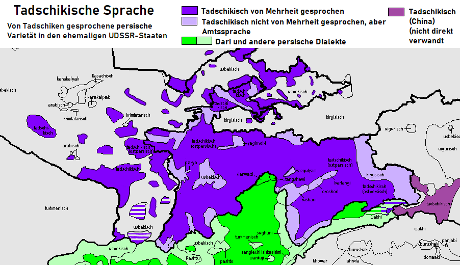 Tadschikische Sprache (Blau-Violett)